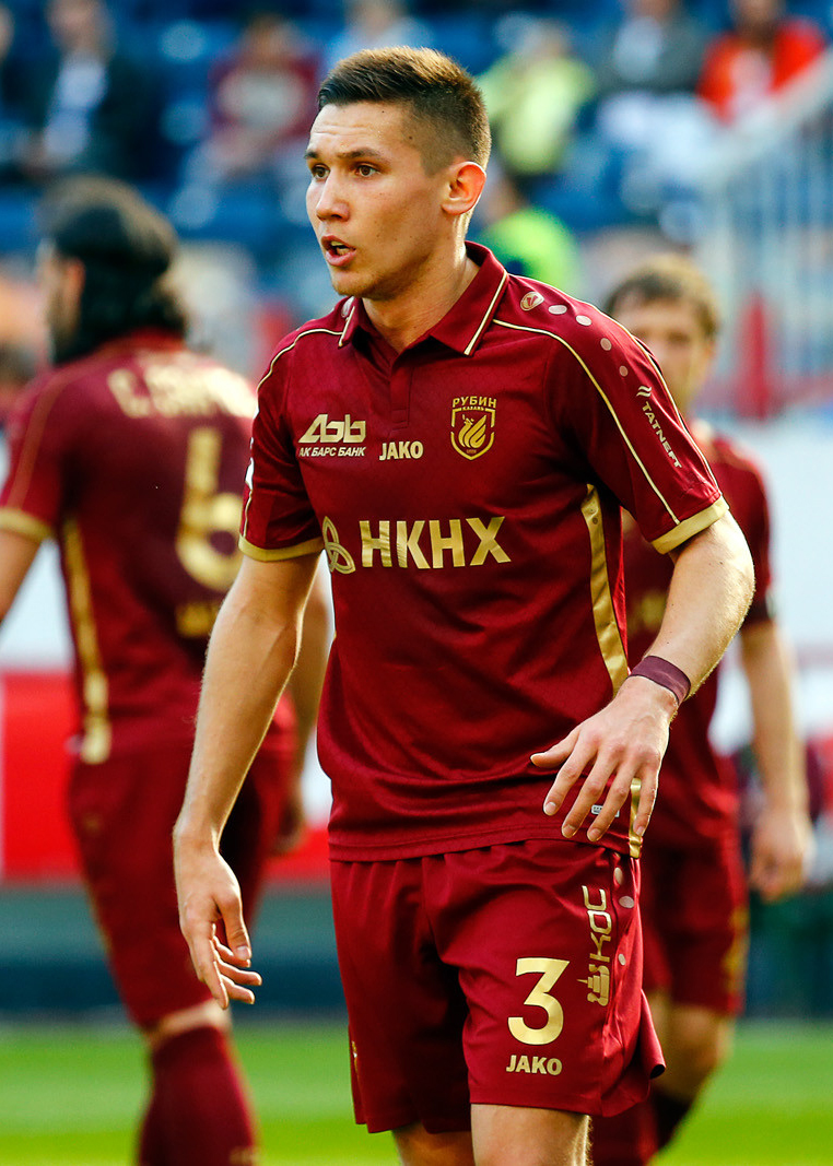 «Локомотив» - «Рубин»